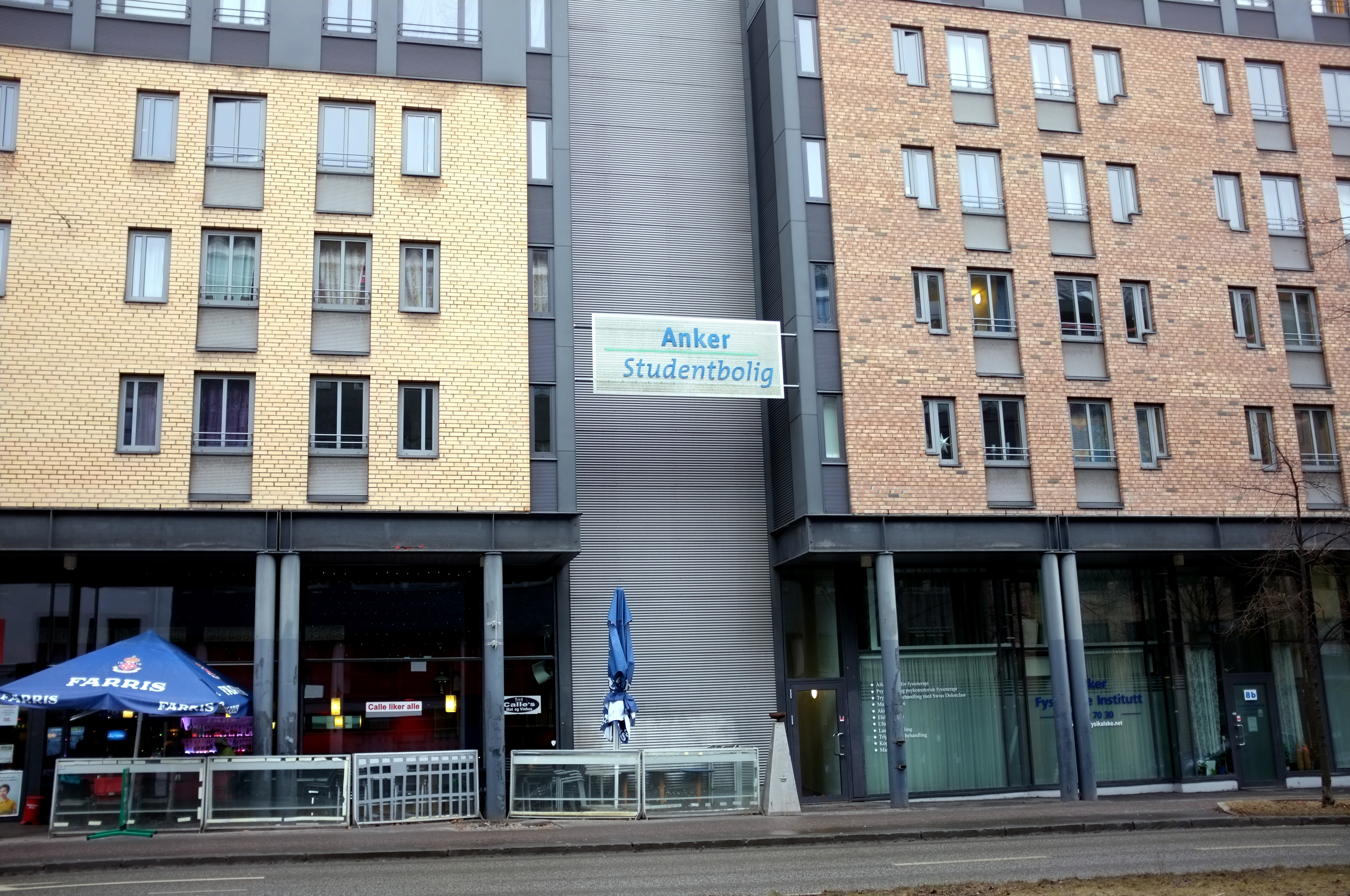 Anker studentbolig i Hausmanns gate i Oslo.